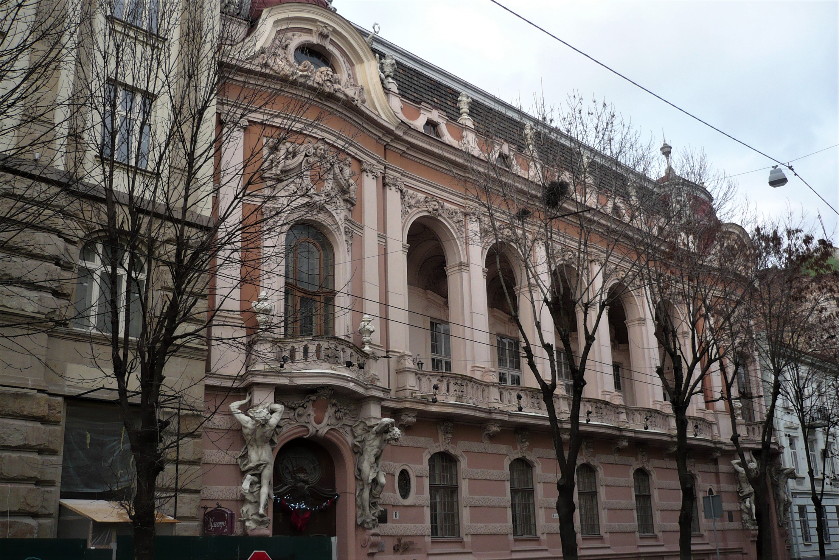 Kasyno szlacheckie we Lwowie